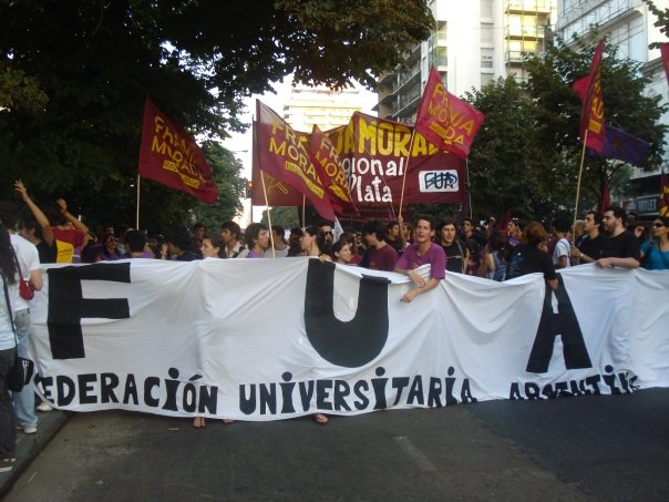 marcha de aumento de presupuesto, fua , mar del plata